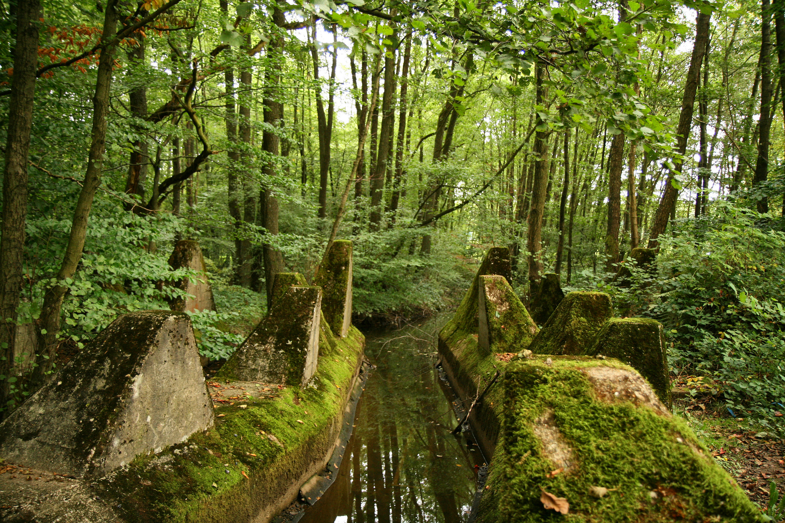 Höckerlinie des Orscholzriegels an der Ziegelei (Weiheranlage).